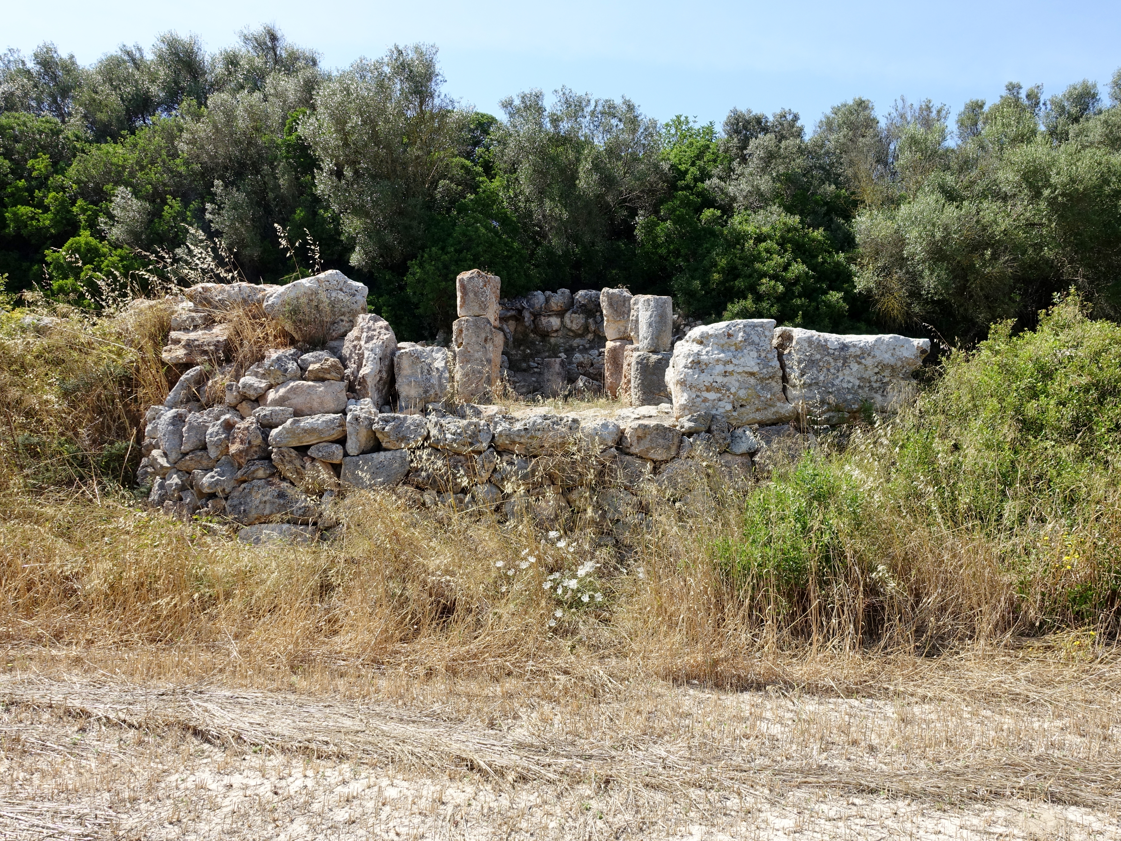 Santuari de Son Corró, Gemeinde Costitx, Mallorca, Spanien